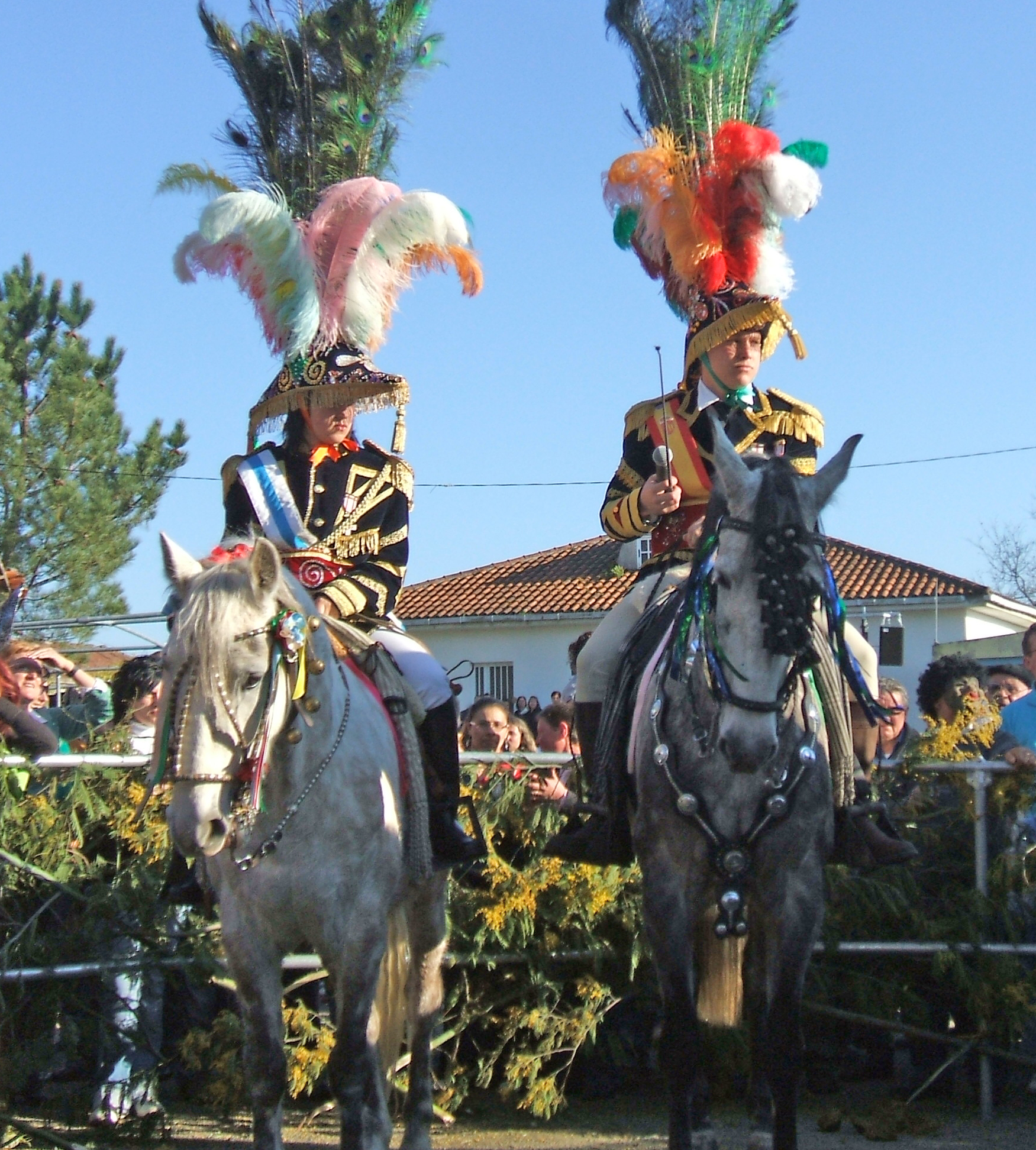 Xenerais do Ulla no martes de entroido